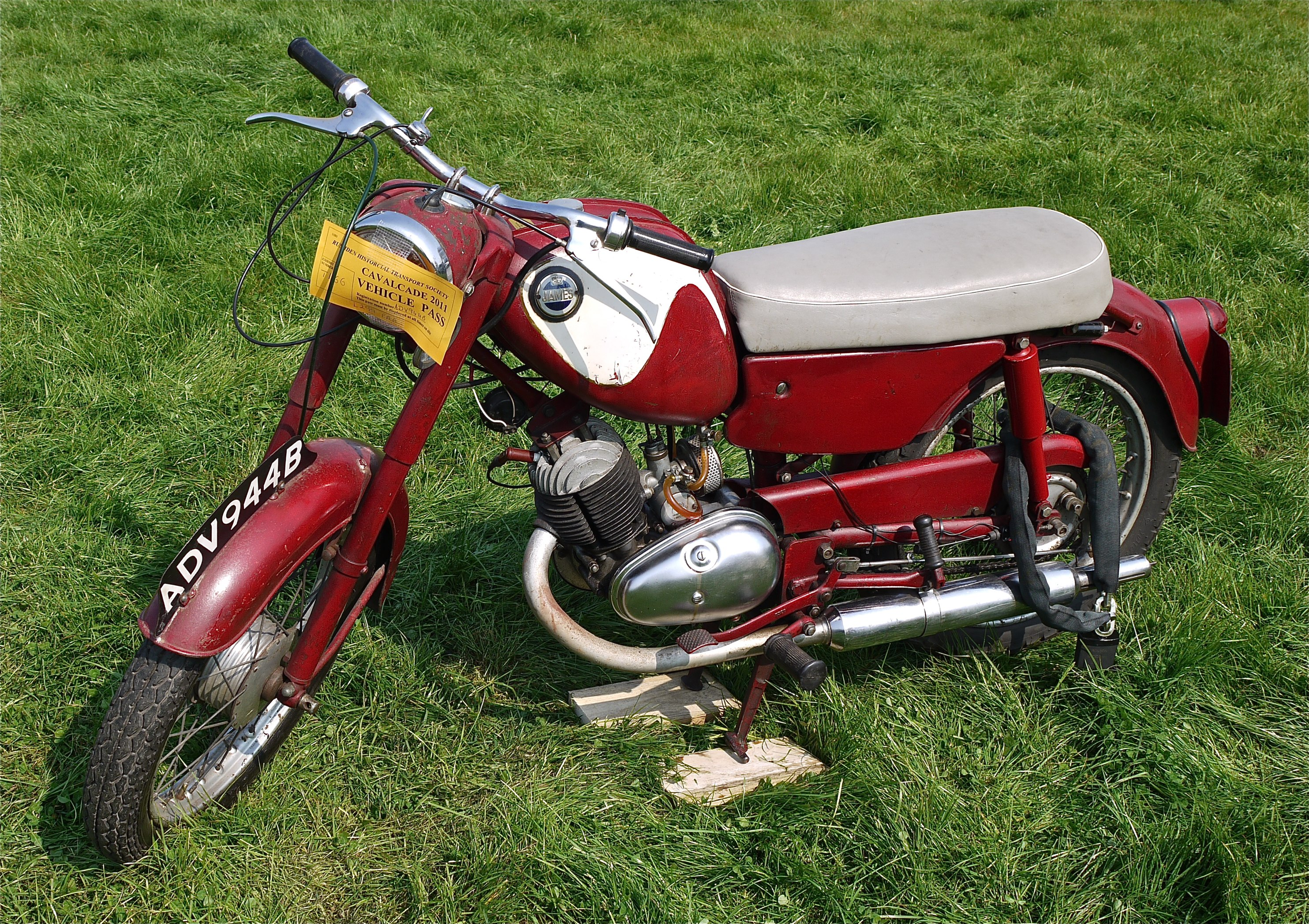 Panasonic G1 14-45 Lens